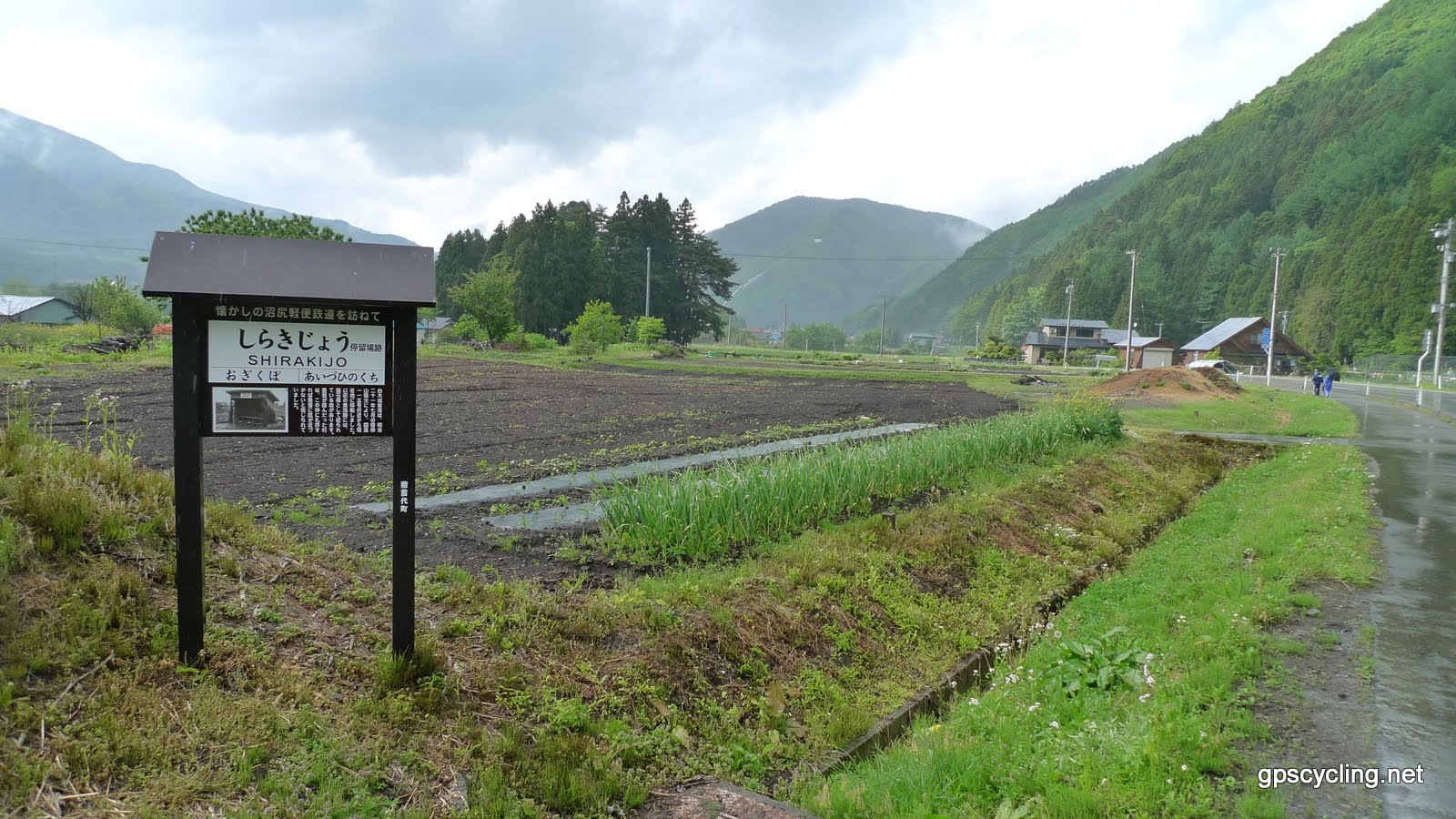 沼尻軽便鉄道白木城駅跡